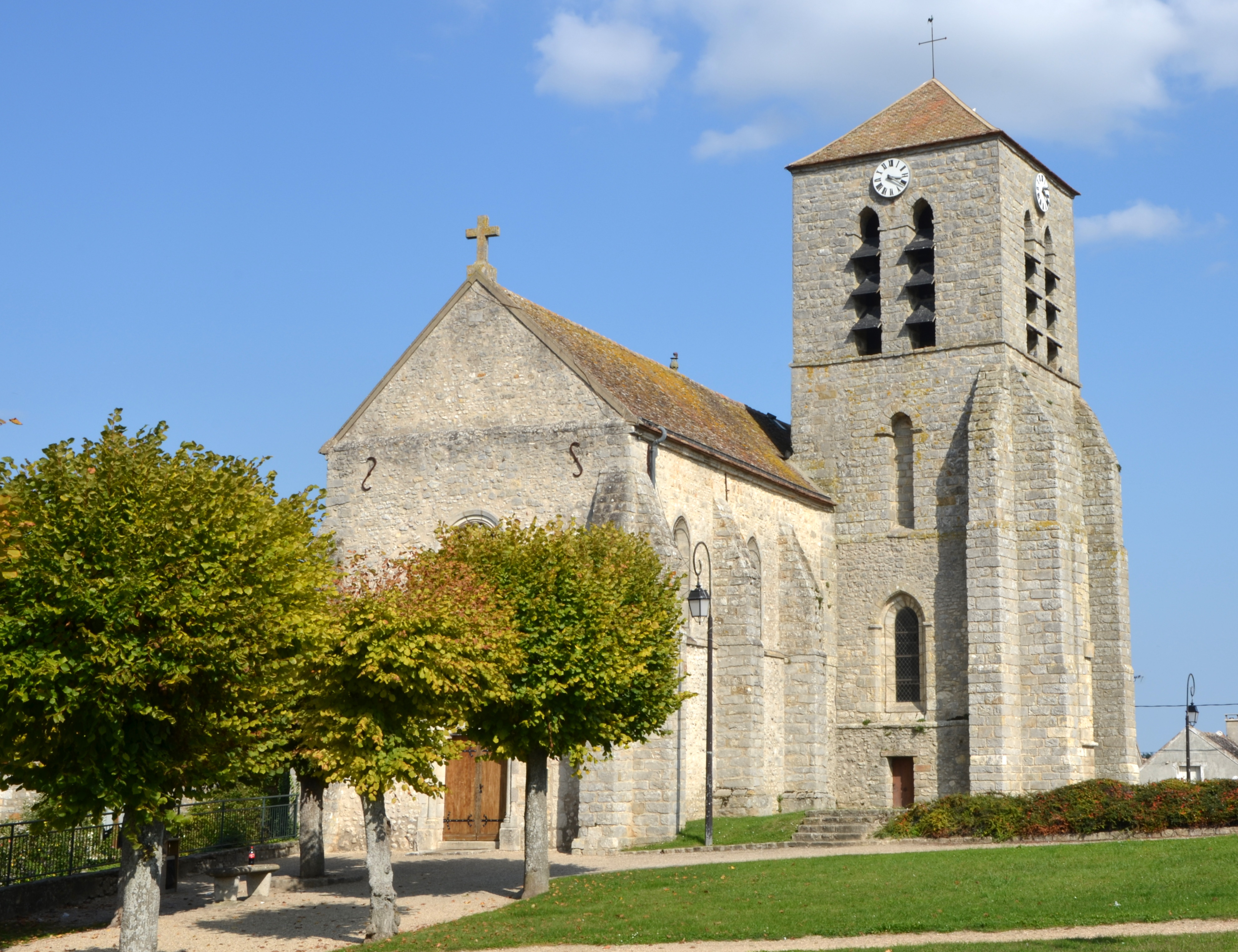 Église d'Écuelles, Seine et Marne, France .